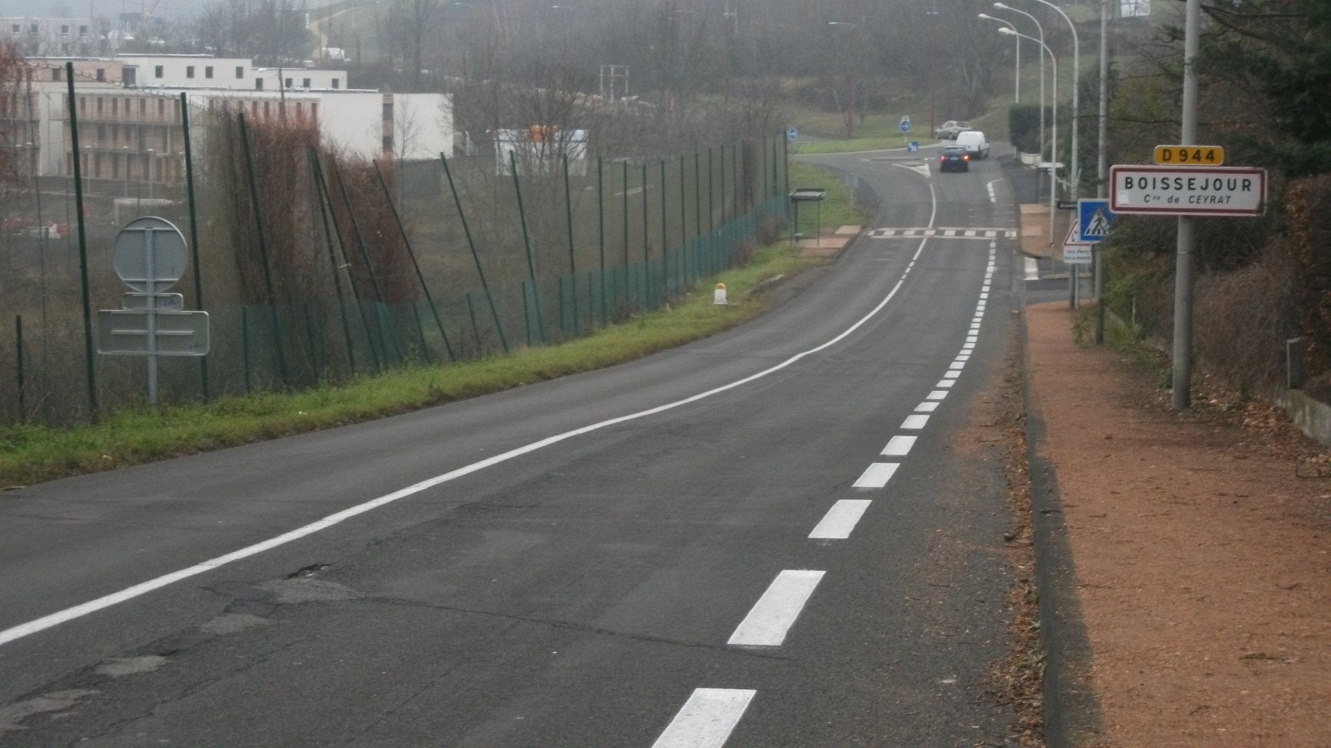 La RD 944 à Boisséjour, commune de Ceyrat. Panneaux à droite, Franche-Comté signaux, 2009 et 2008